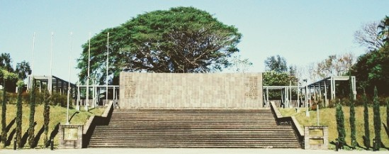 Monumento de los proceres cual contiene los nombres del participe de El Segundo movimiento independentista de San Salvador de 1814